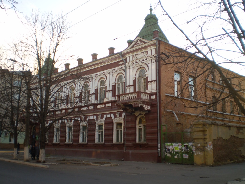 Азовско-Донской банк